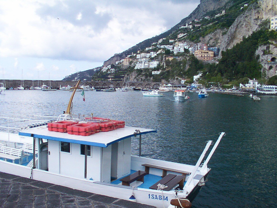 Costiera Amalfitana